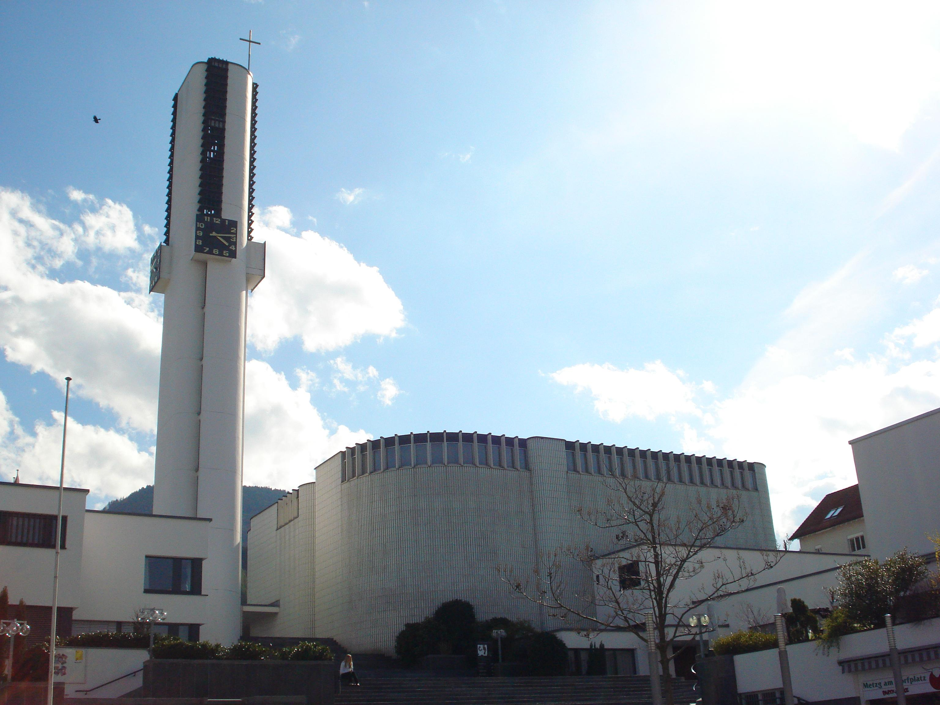 röm.-kath. Kirche Pfäffikon SZ